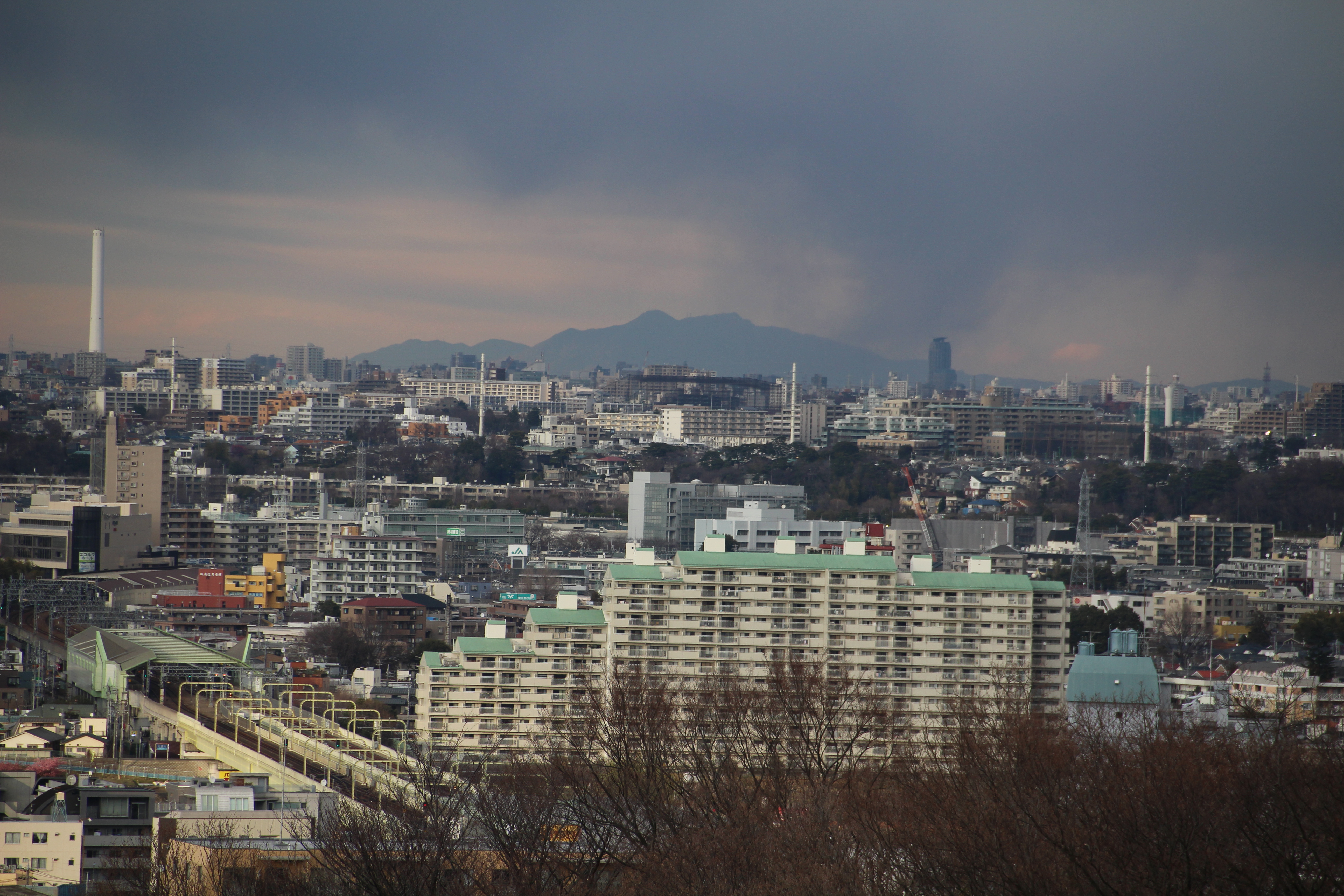 Der Berg Tsukuba von Park Ikuta-Ryokuchi in Kawasaki (Kanagawa) gesehen